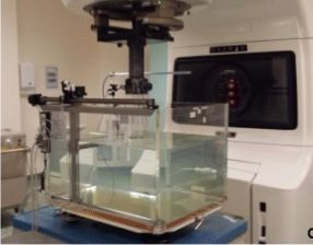 Трьохкоординатний автоматизований водний фантом типу MP3 (PTW Freiburg)